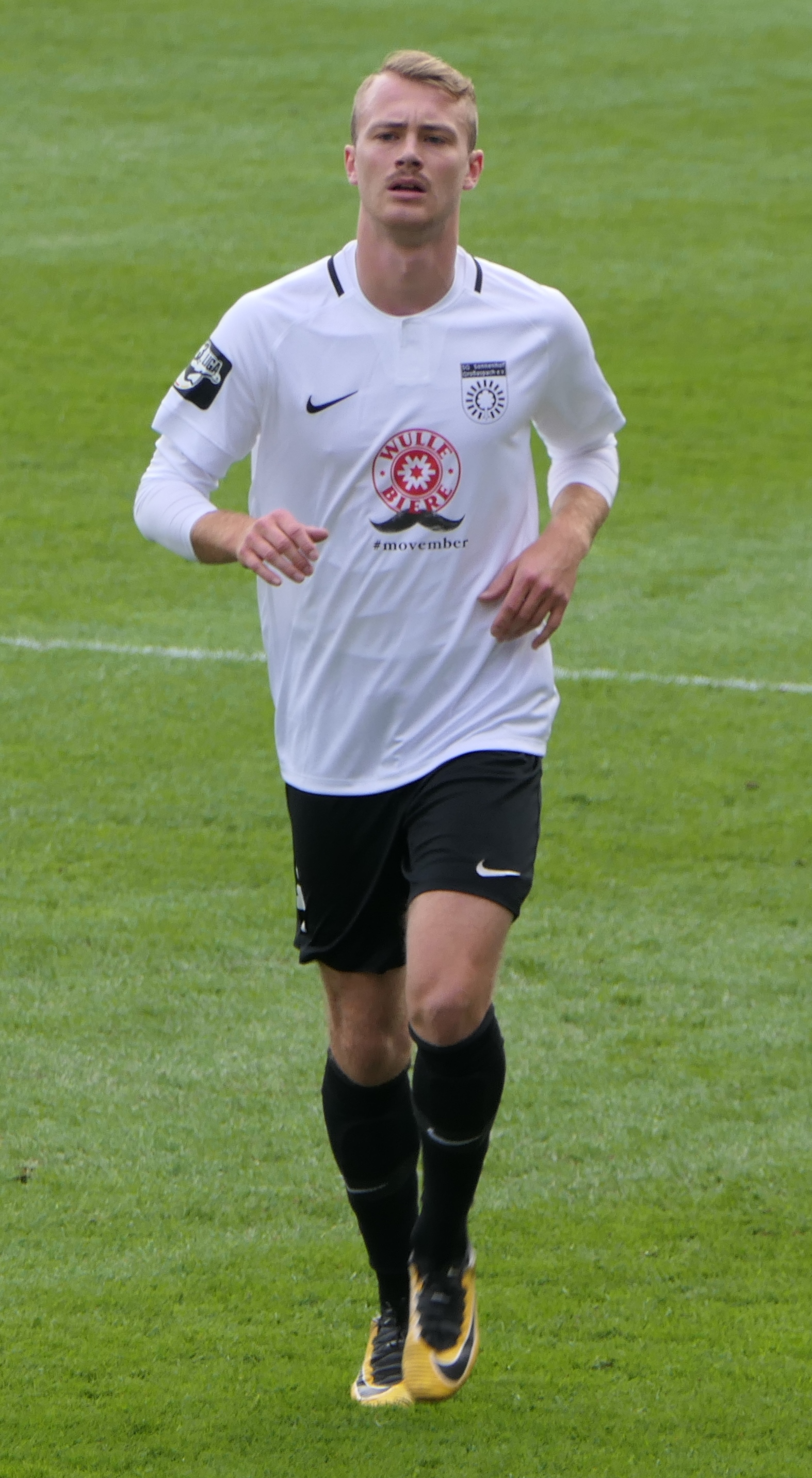 Der Fussballprofi Korbinian Burger im Trikot der SG Sonnenhof Großaspach beim Heimspiel gegen Eintracht Braunschweig am 03.11.2018.